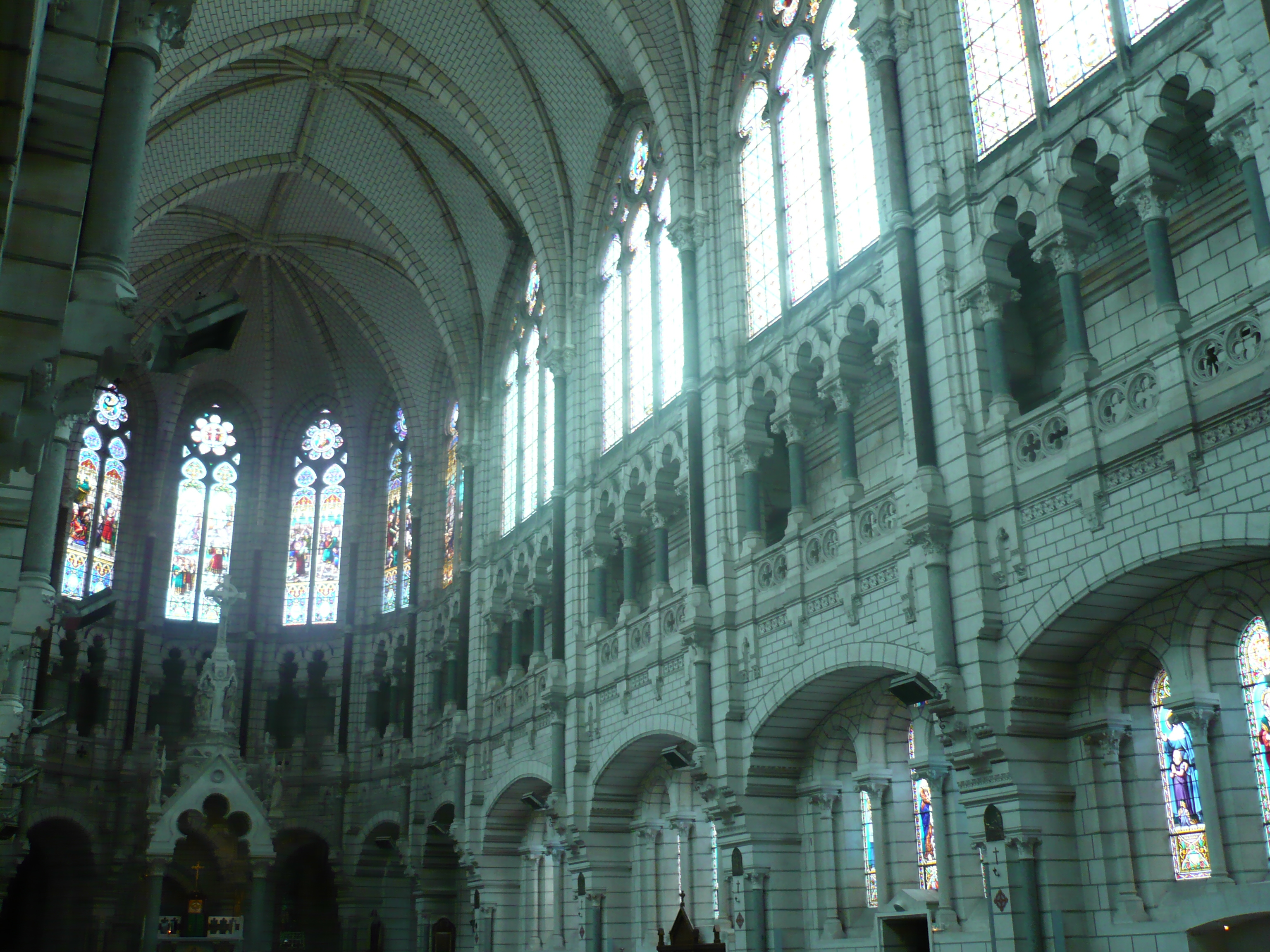 Eglise Saint-Etienne-du-Port de Niort. Vue de la nef et du choeur.